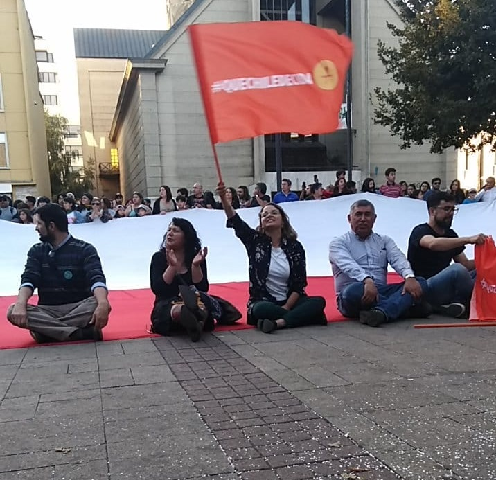 Carla Amtmann en el banderazo